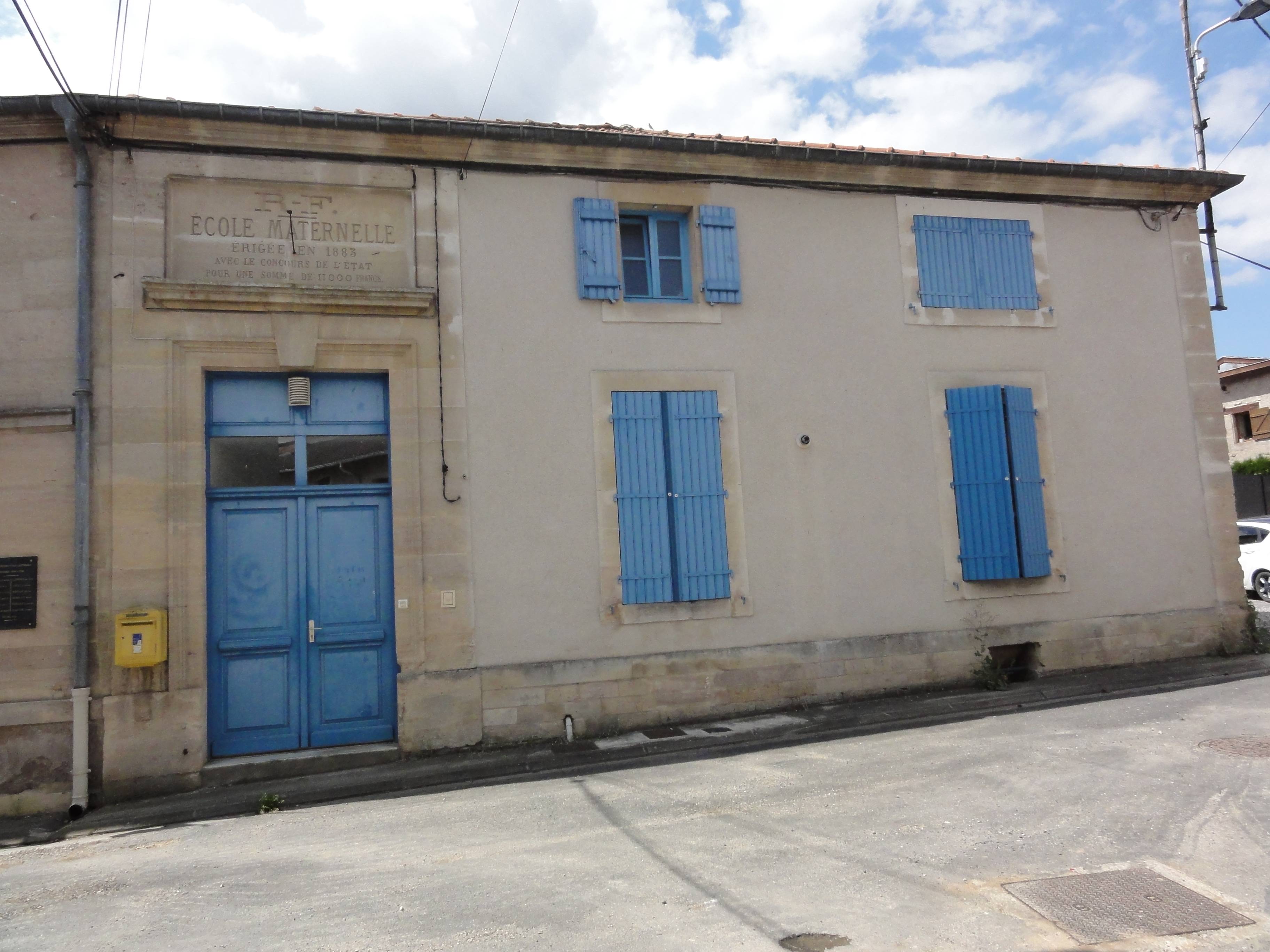 Naives-Rosières (Meuse) Rosières, école maternelle